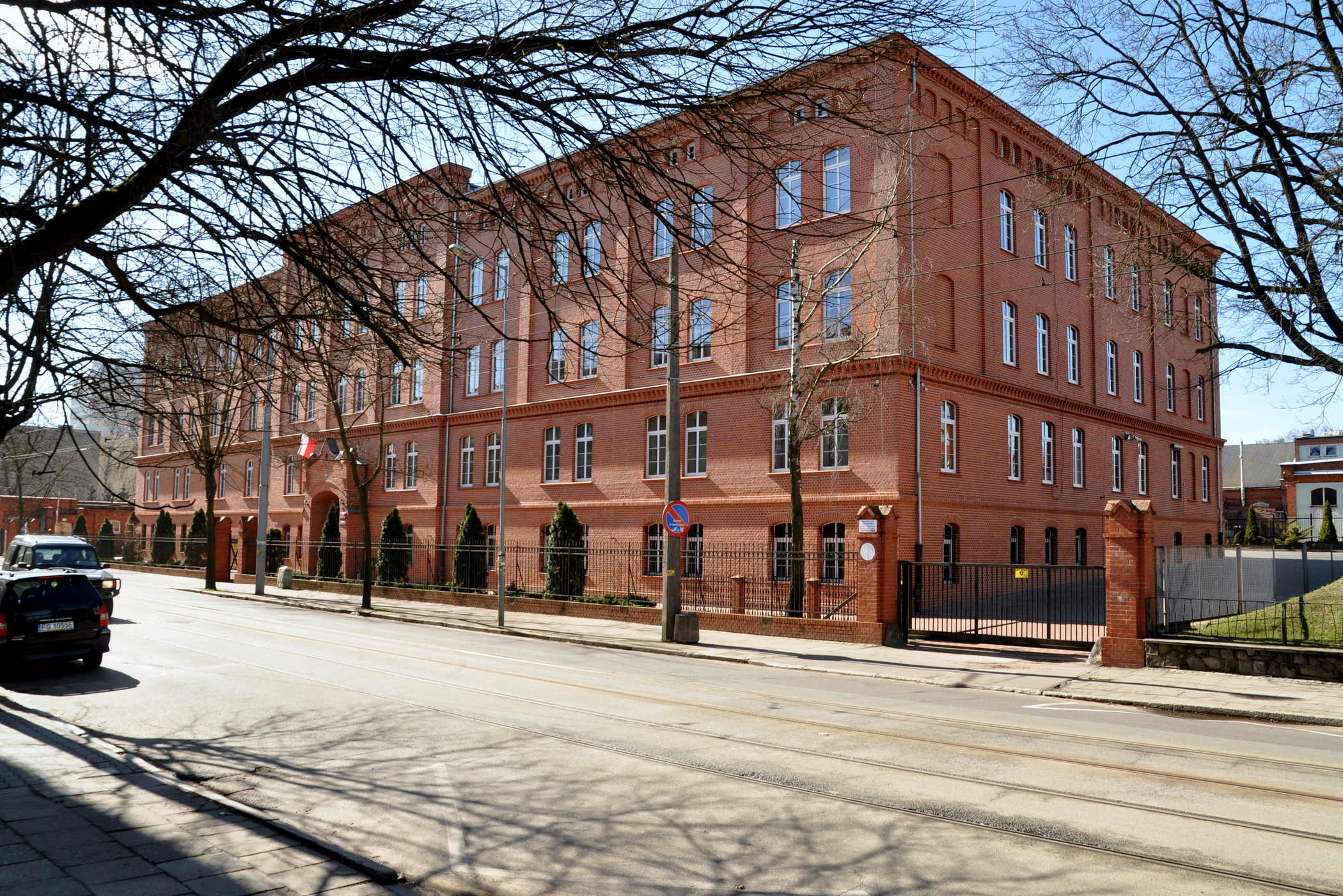 Sąd Okręgowy w Gorzowie Wlkp. ul. Mieszka I 33. Obiekt pobudowano jako koszary artyleryjskie i służył armii w latach 1895 - 1920. Na fotografii - po remoncie elewacji.